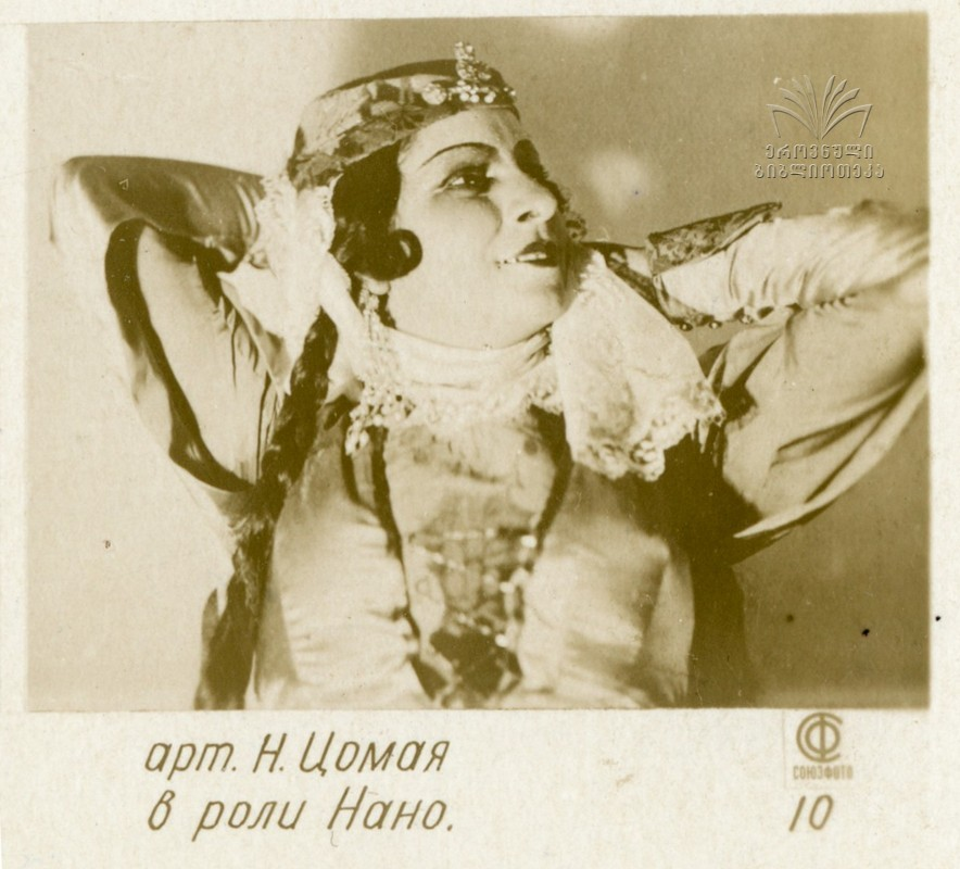 მეცო-სოპრანო, ნადეჟდა ცომაია